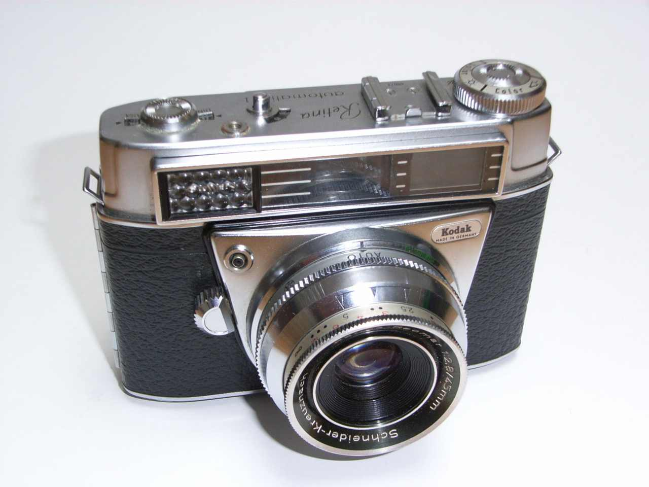 Kodak Retina Automatic I; Retina-Reomar 1:2,8/45mmm; Protormat-S Bj ca. 1962